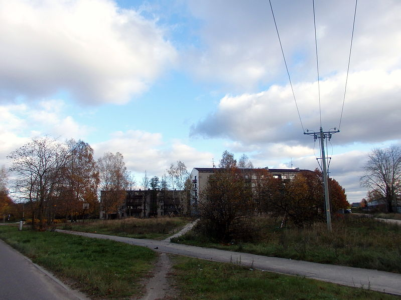 Rue Sila dans le voisinage de Šķirotava à Riga.